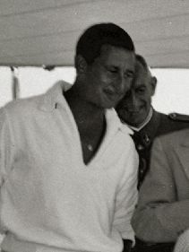 Título original: Franco y sus nietos en el Azor (4/4) Localización: Guipúzcoa